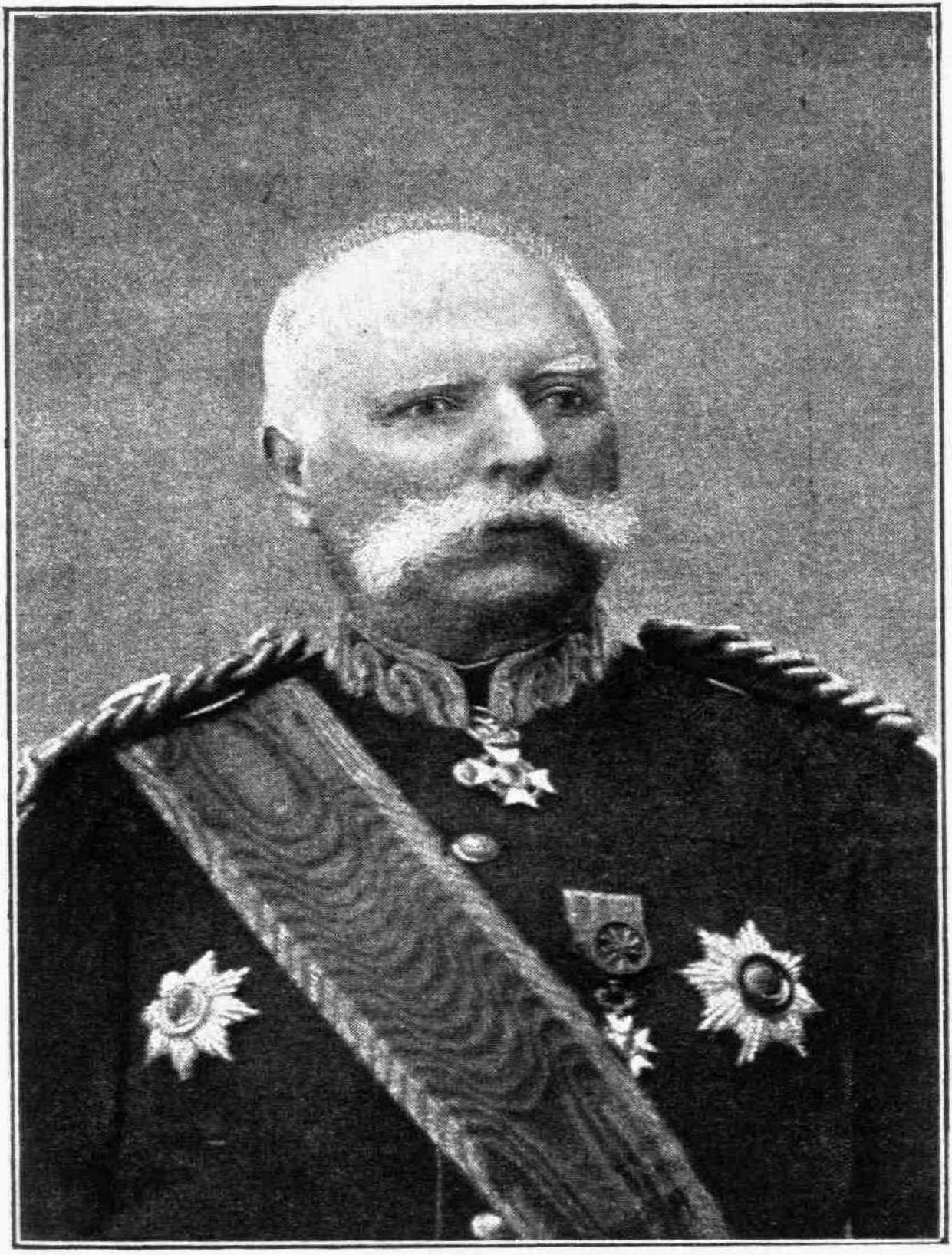 griechischer Militär, 19. Jahrhundert